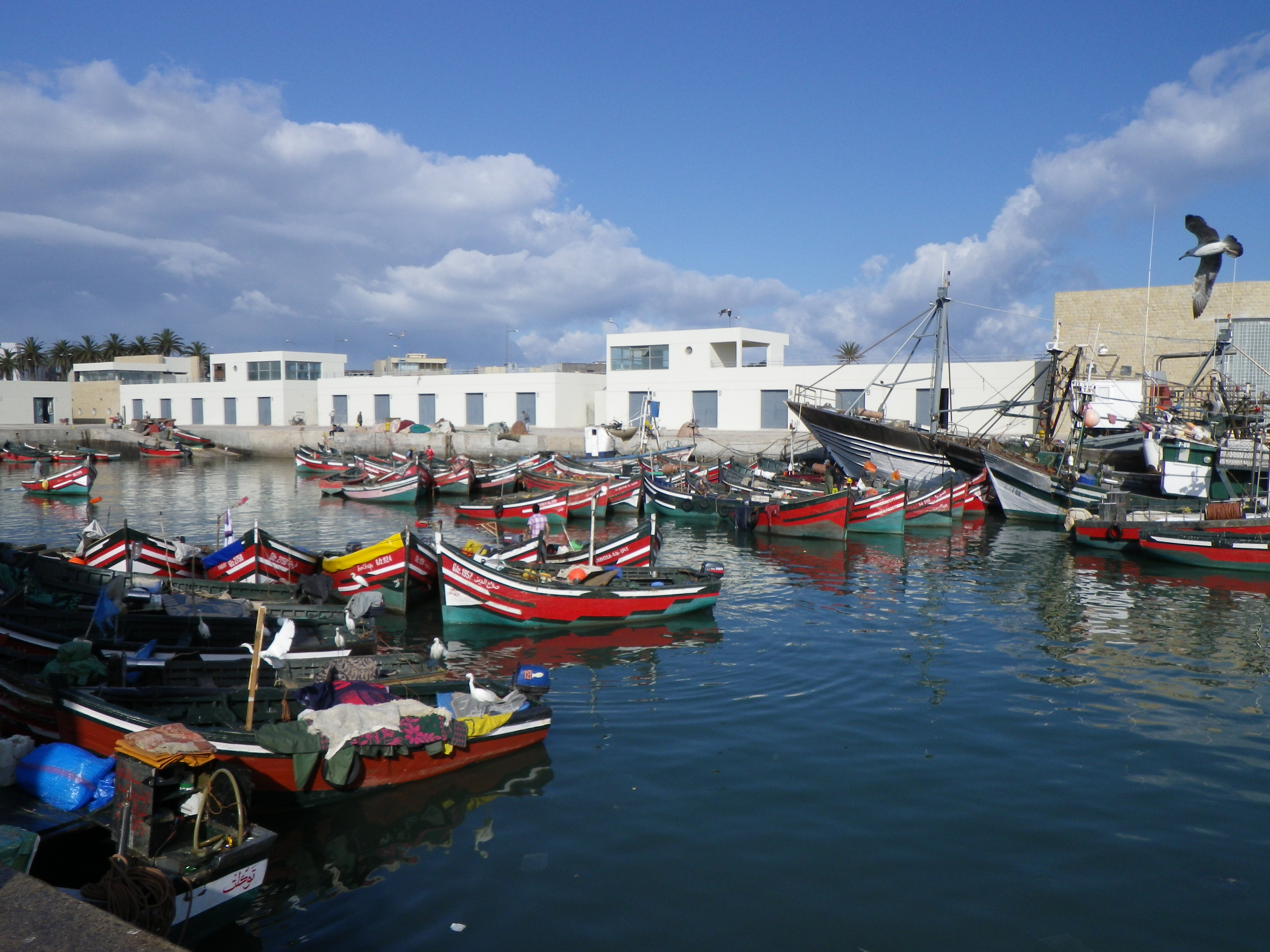 Retour de la pêche à El Jadida